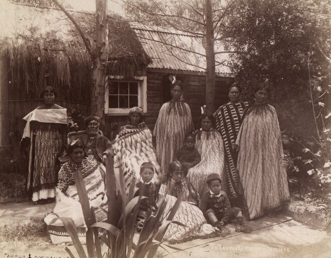 Famille Maori, Te Taurua, Rotorua. Maori Family, Te Taurua, Rotorua.